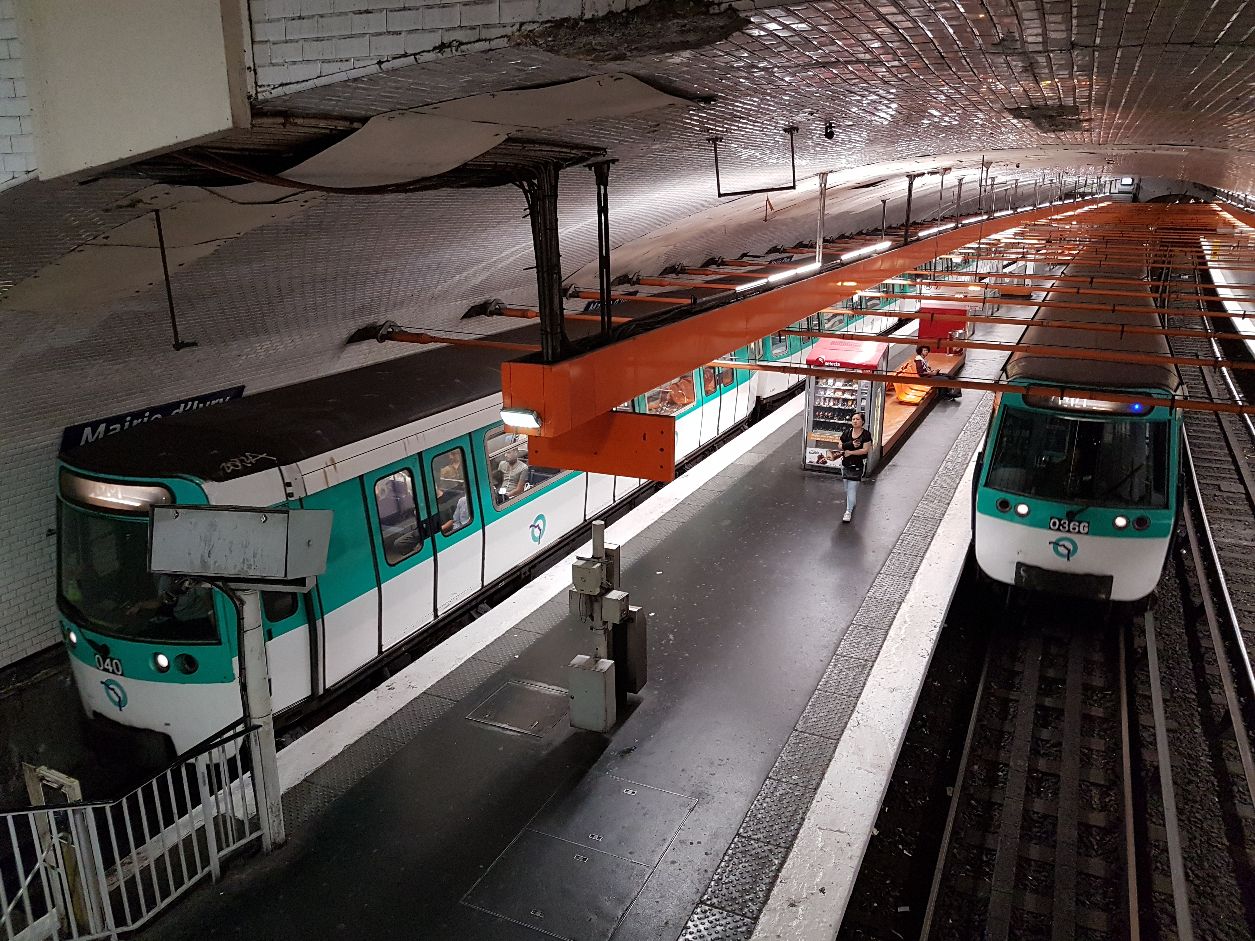 MF77 à Mairie d'Ivry, au terminus de l'une des deux branches sud de la ligne 7 du métro parisien.